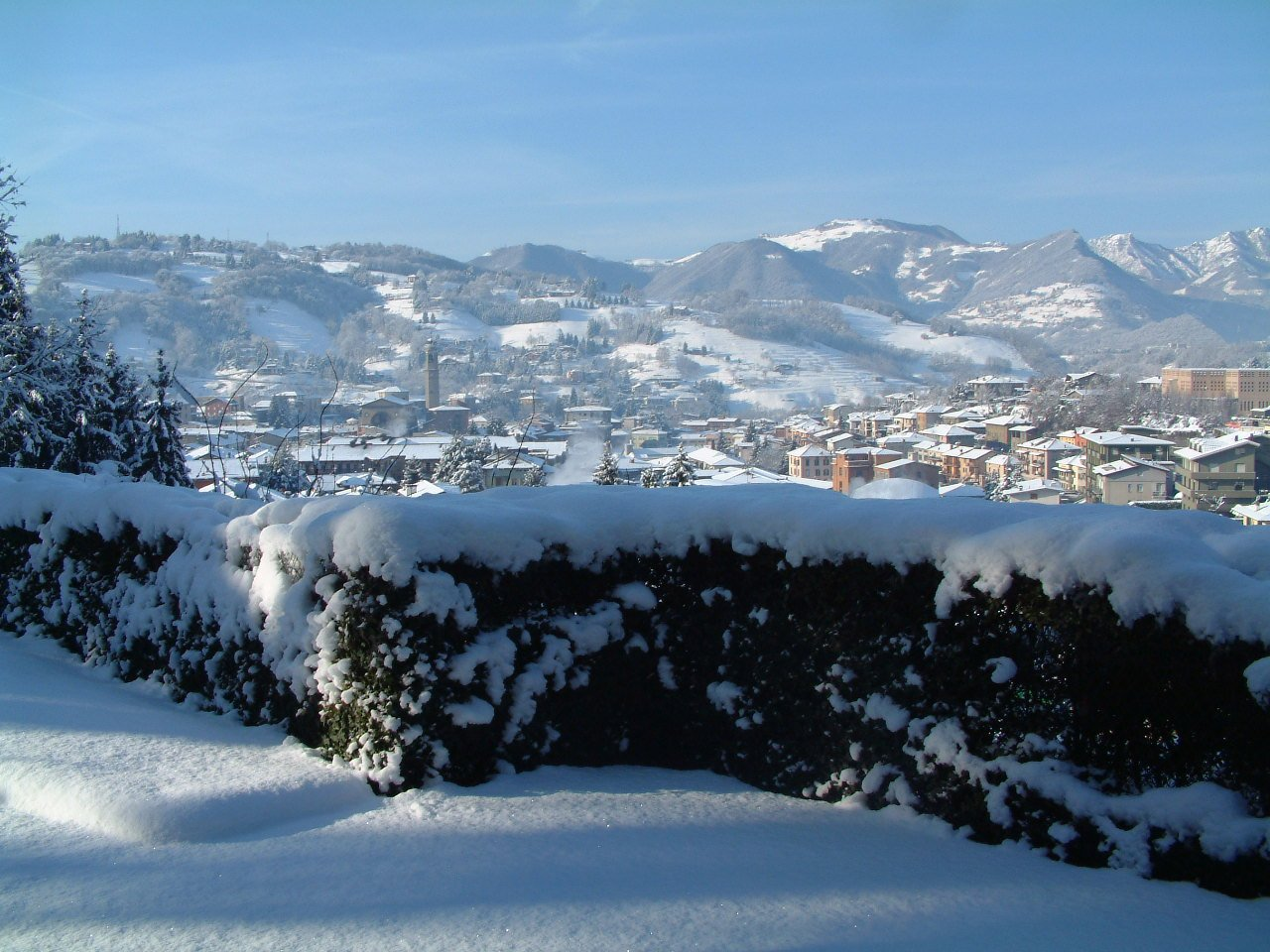 Leffe Village in winter